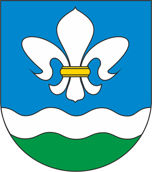 Herb gminy Lądek